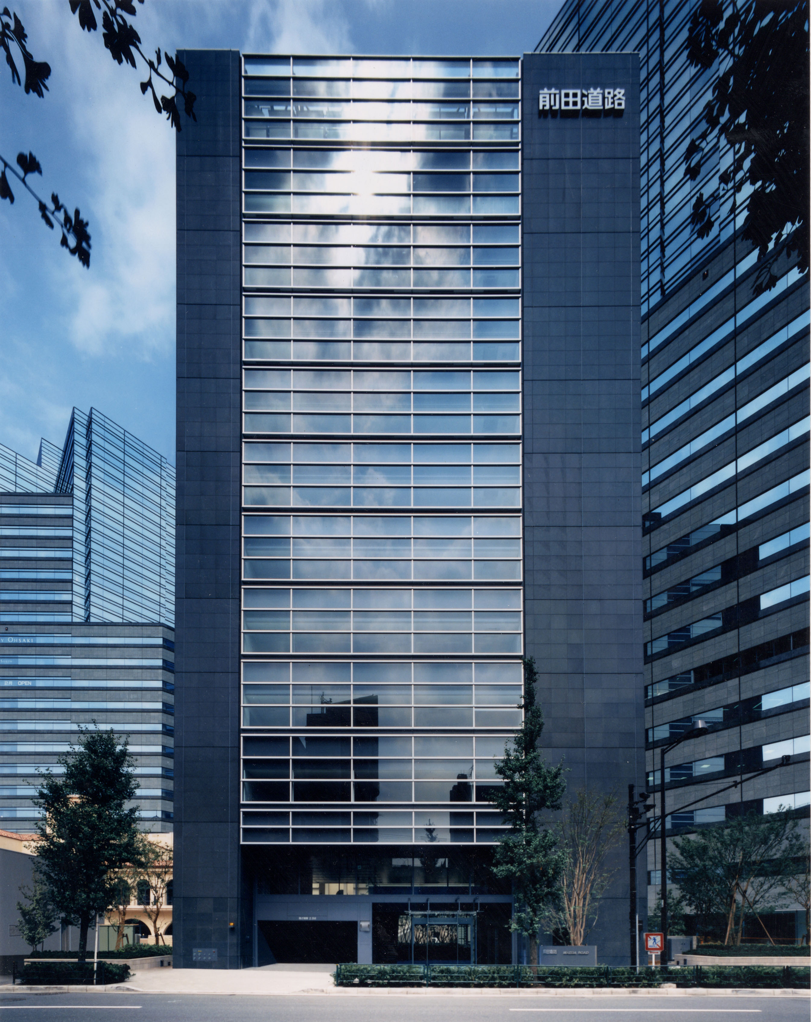 ＭＤ本社ﾋﾞﾙ